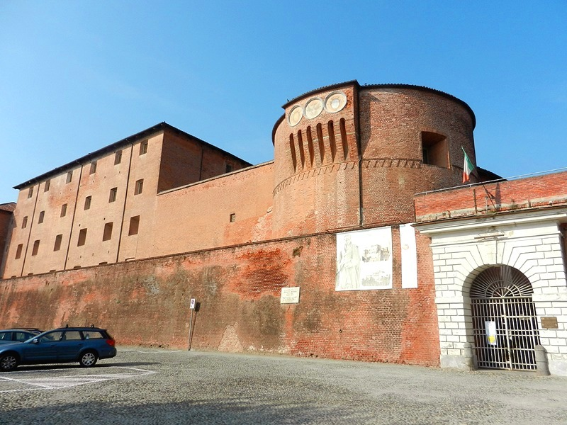 Saluzzo - Castiglia